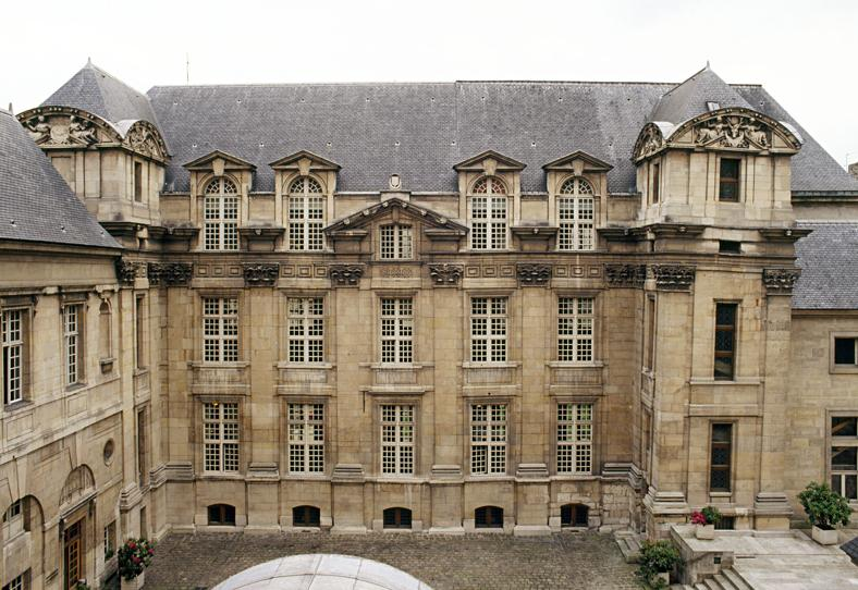 Bâtiment abritant la BHVP